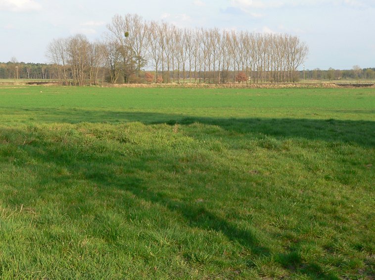 Burgstelle Wahrenholz